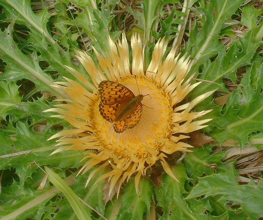 Carline acaule, photo J.F. Gaffard, Melles, août 2004